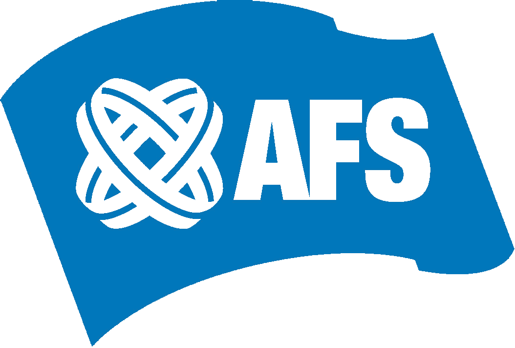 international AFS logo